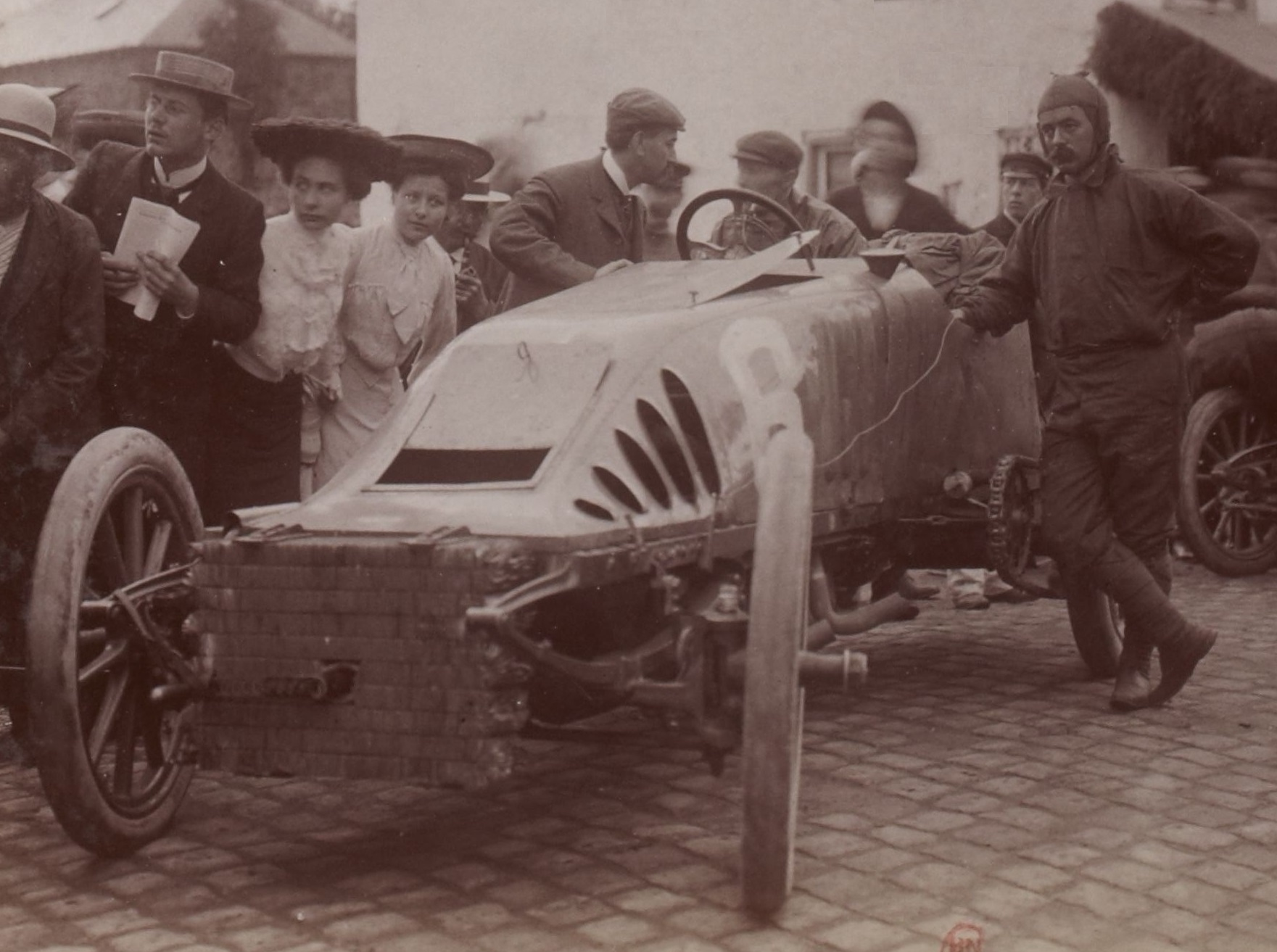 [Collection Jules Beau. Photographie sportive] : T. 27. AnnÃ©e 1904 / Jules Beau : F. 27. Circuit des Ardennes, Bastogne, 25 juillet 1904